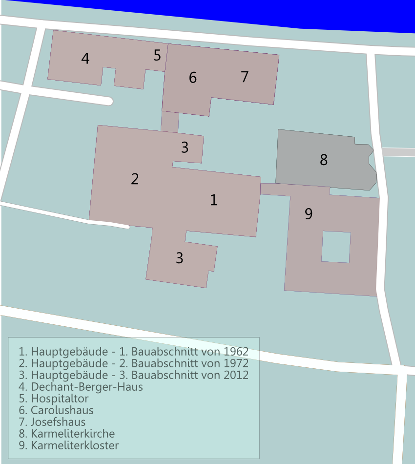 Plan des Gesundheitszentrum zum Heiligen Geist in Boppard Hauptgebäude - 1. Bauabschnitt von 1962 Hauptgebäude - 2. Bauabschnitt von 1972 Hauptgebäude - 3. Bauabschnitt von 2012 Dechant-Berger-Haus Hospitaltor Carolushaus Josefshaus Karmeliterkirche Karmeliterkloster